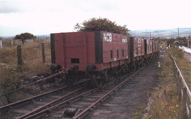 Traction par câble (rope-hauling)